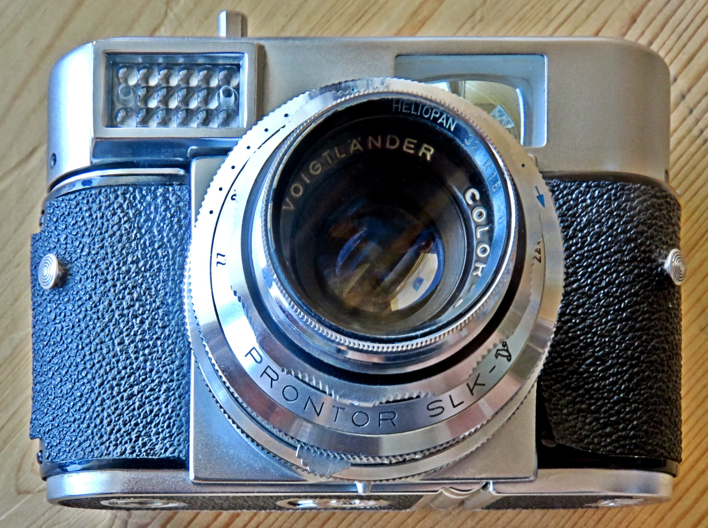 Kleinbildsucherkamera (24x36mm) der Firma Voigtländer, Modell: Vitomatic I Prontor SLK-V, Herstellungsjahr 1957, Brennweite: 50mm, Blende 1:2.8, mit Selen-Belichtungsmesser, Blitzschuh, mit UV-Filter Originalpreis 270 DM